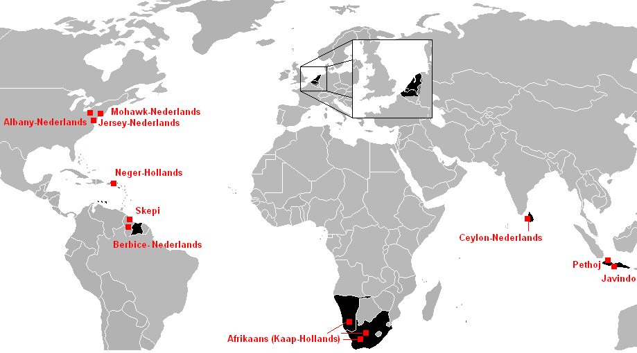 eigen kaart